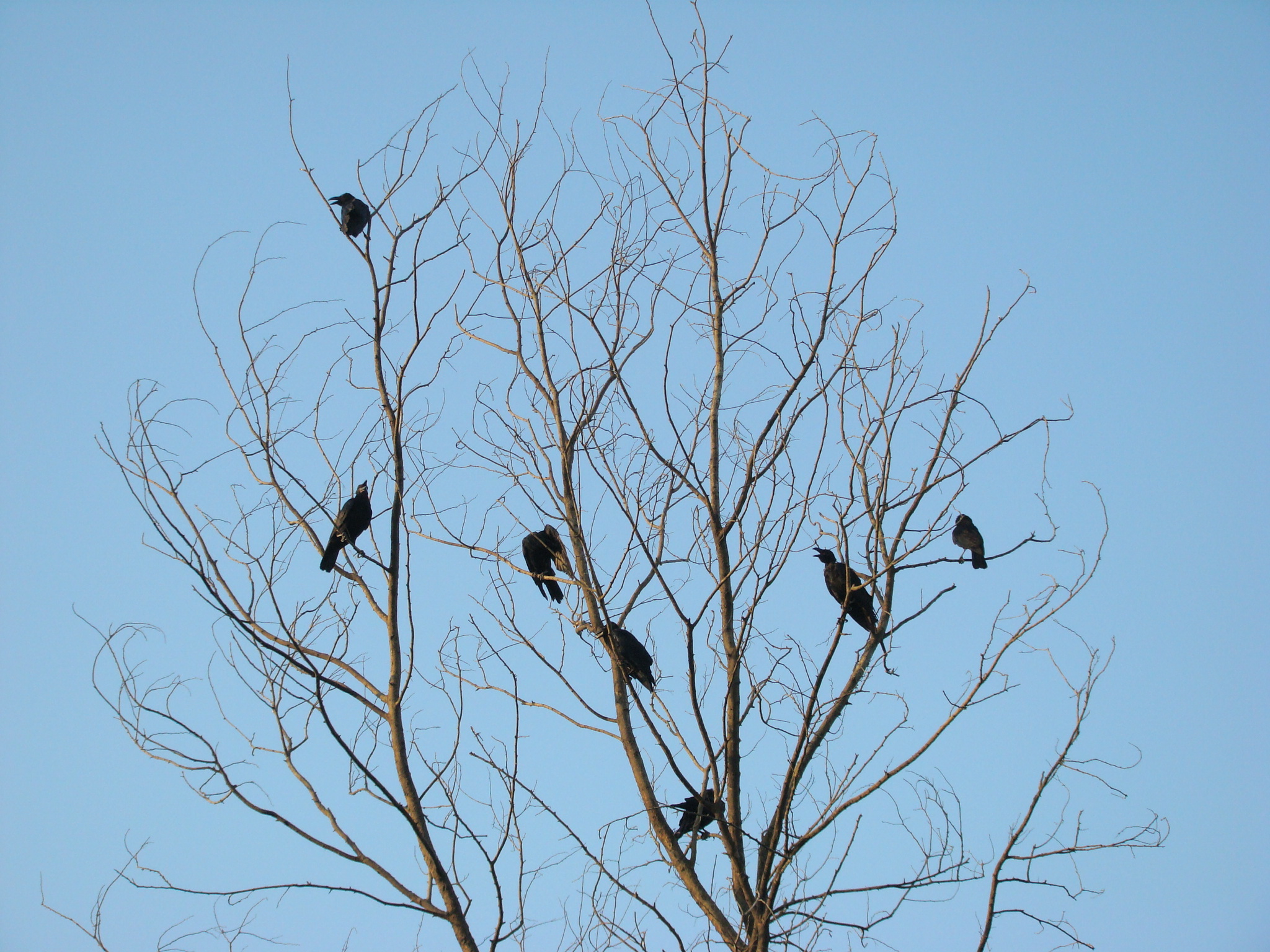 Corvus levaillantii, Bangladesh